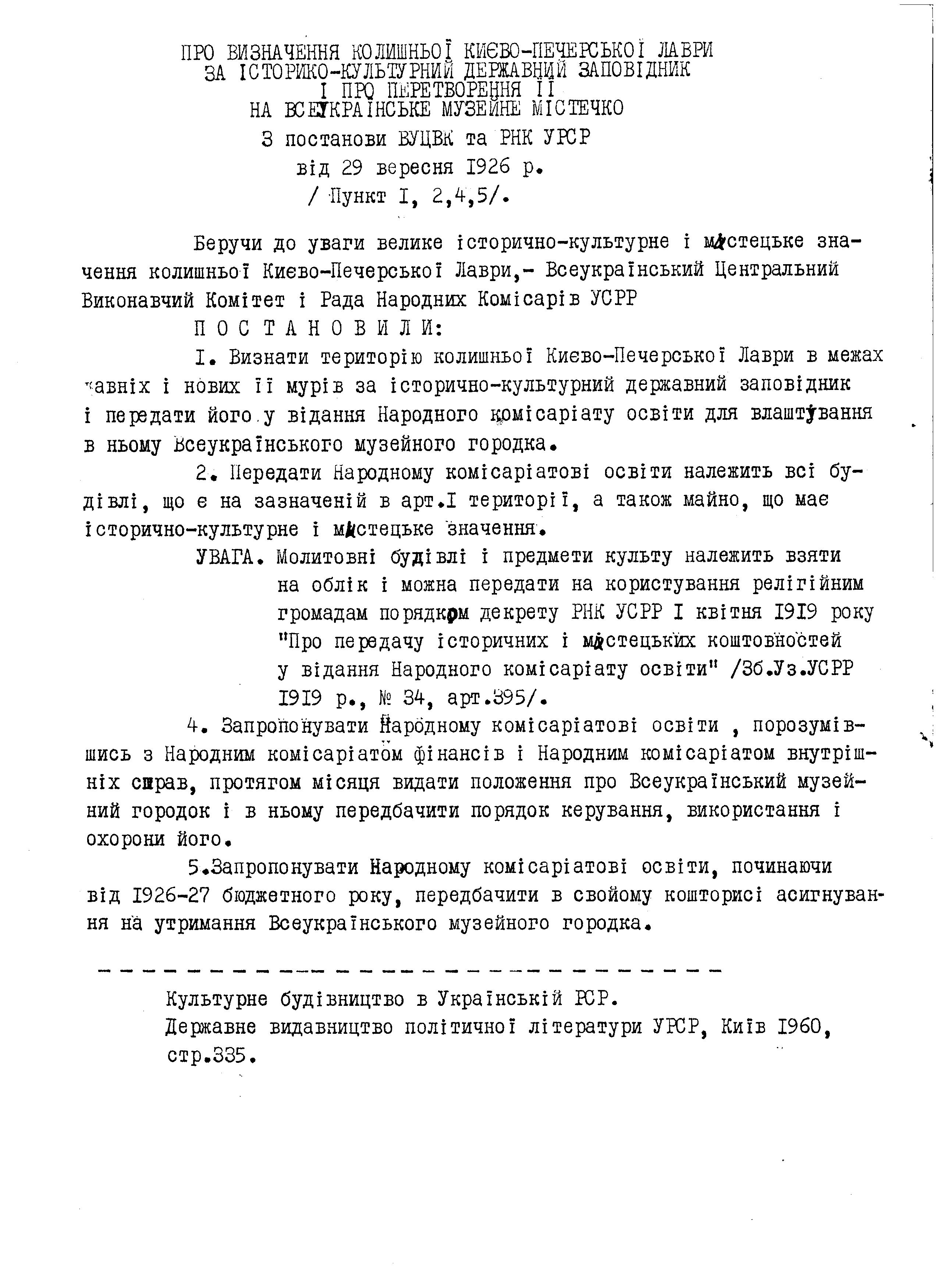 29 вересня 1926 р. ВУЦВК і Рада Народних Комісарів УСРР ухвалили постанову «Про визнання колишньої Києво-Печерської лаври історико-культурним державним заповідником і перетворення її на Всеукраїнське музейне містечко».